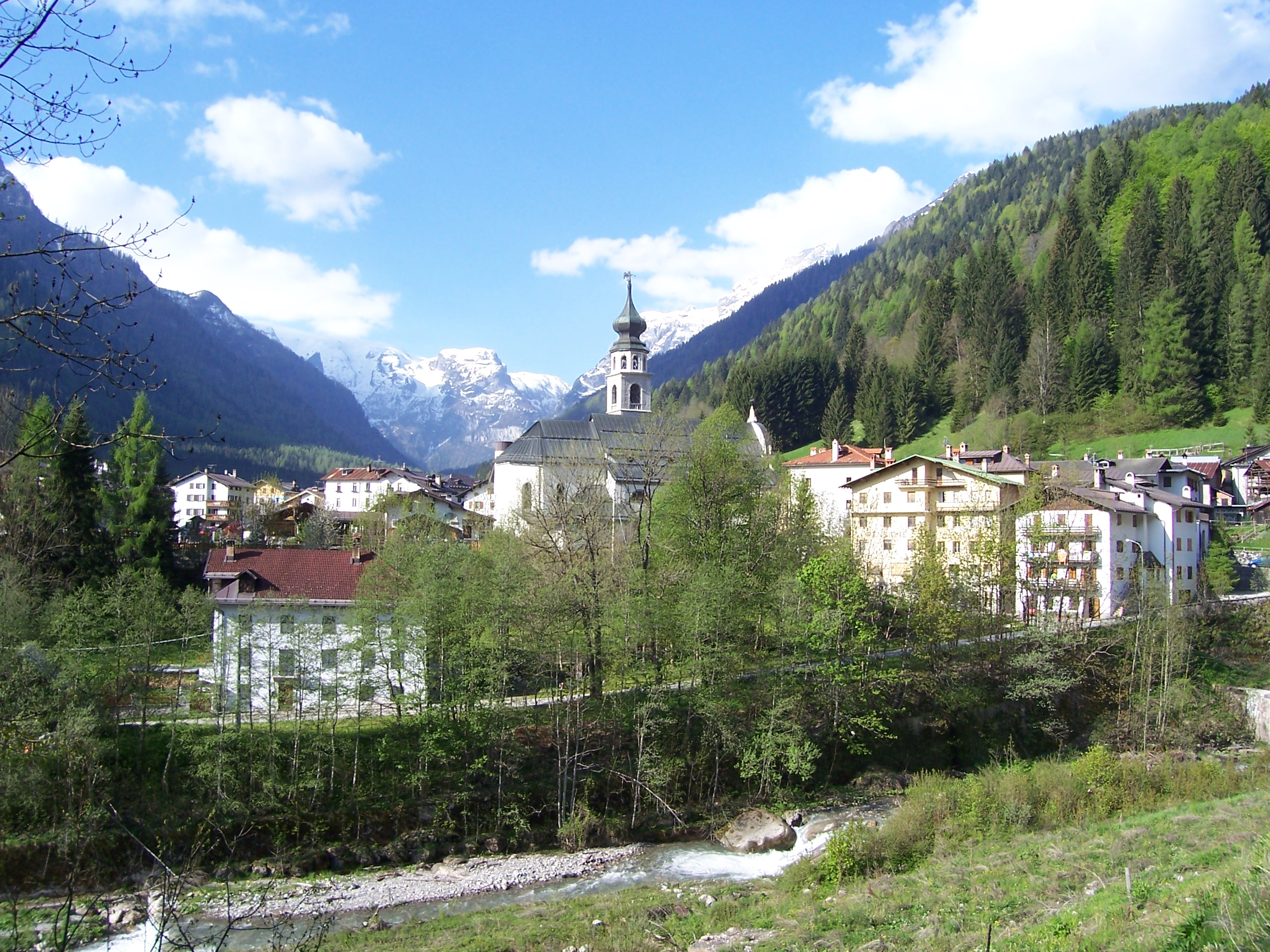 Canale d'Agordo in provincia di Belluno